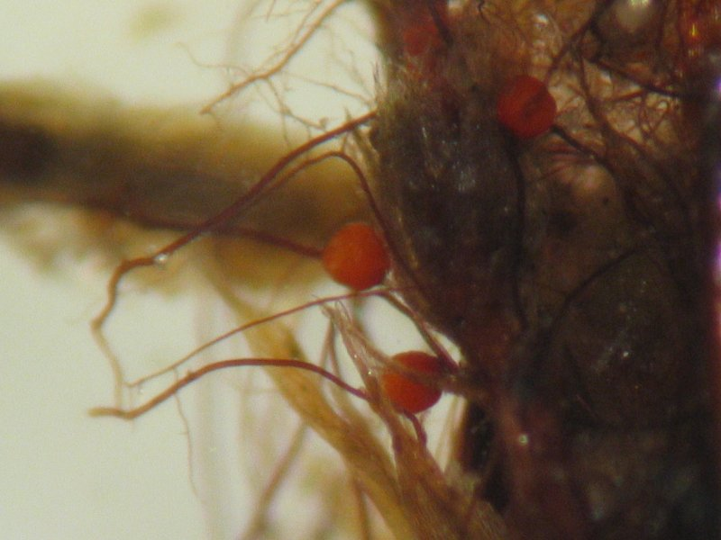 Bryum subapiculatum, Rhizoidgemmen, etwa 30x vergrößert, Rostock